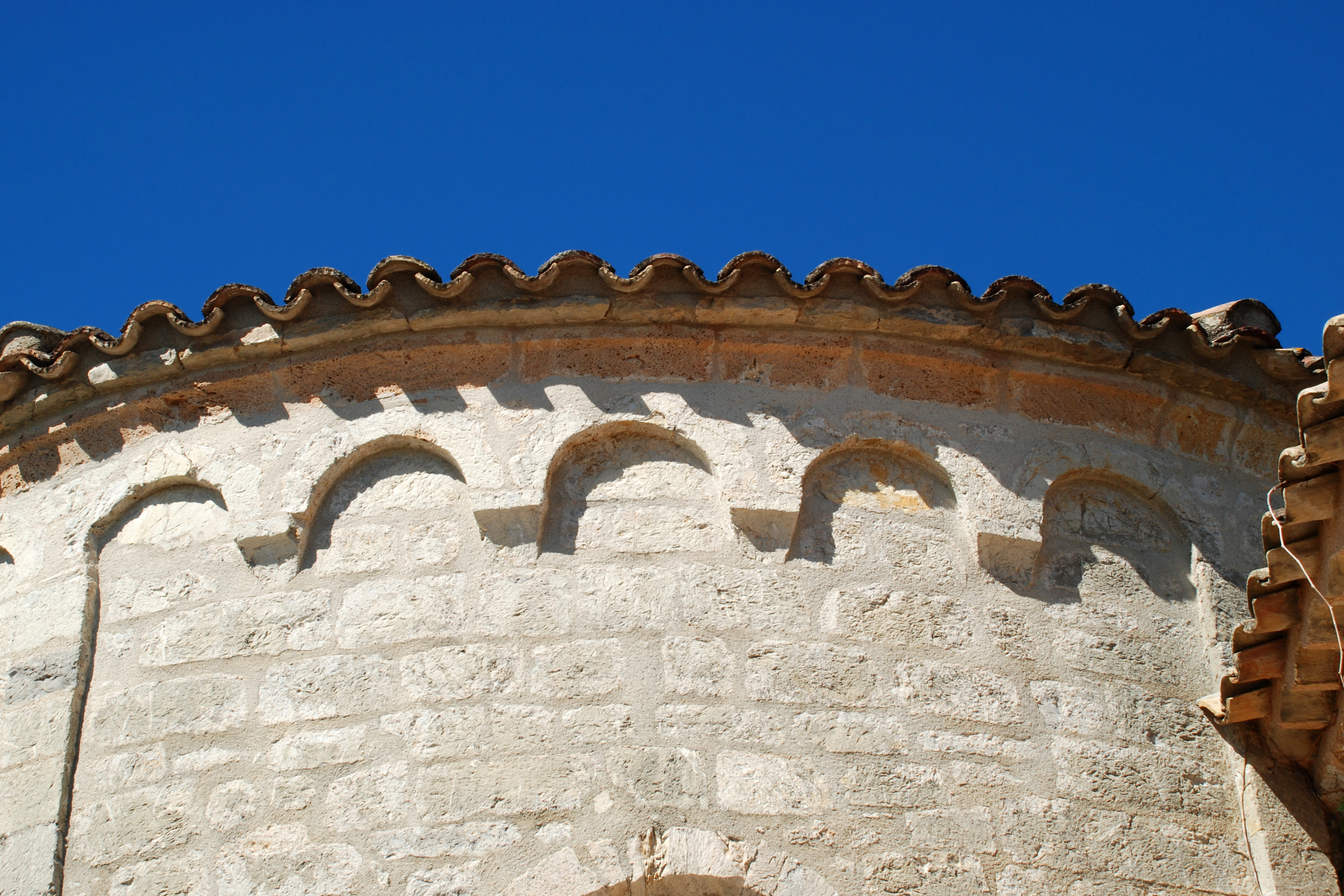 France - Languedoc - Hérault - Église de Saint-André-de-Buèges